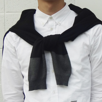 プロデューサー巻きの基本的な着こなしのスタイル